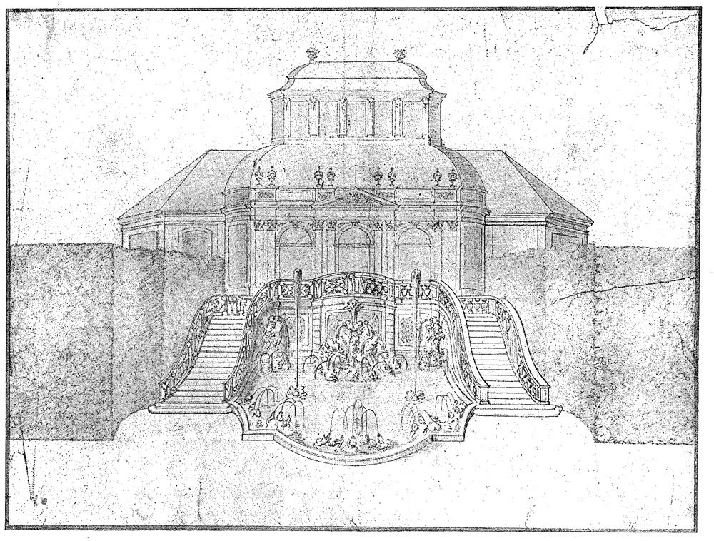 Risszeichnung des Porzellanhaus, Lustschloss Favorite Mainz, um 1730.